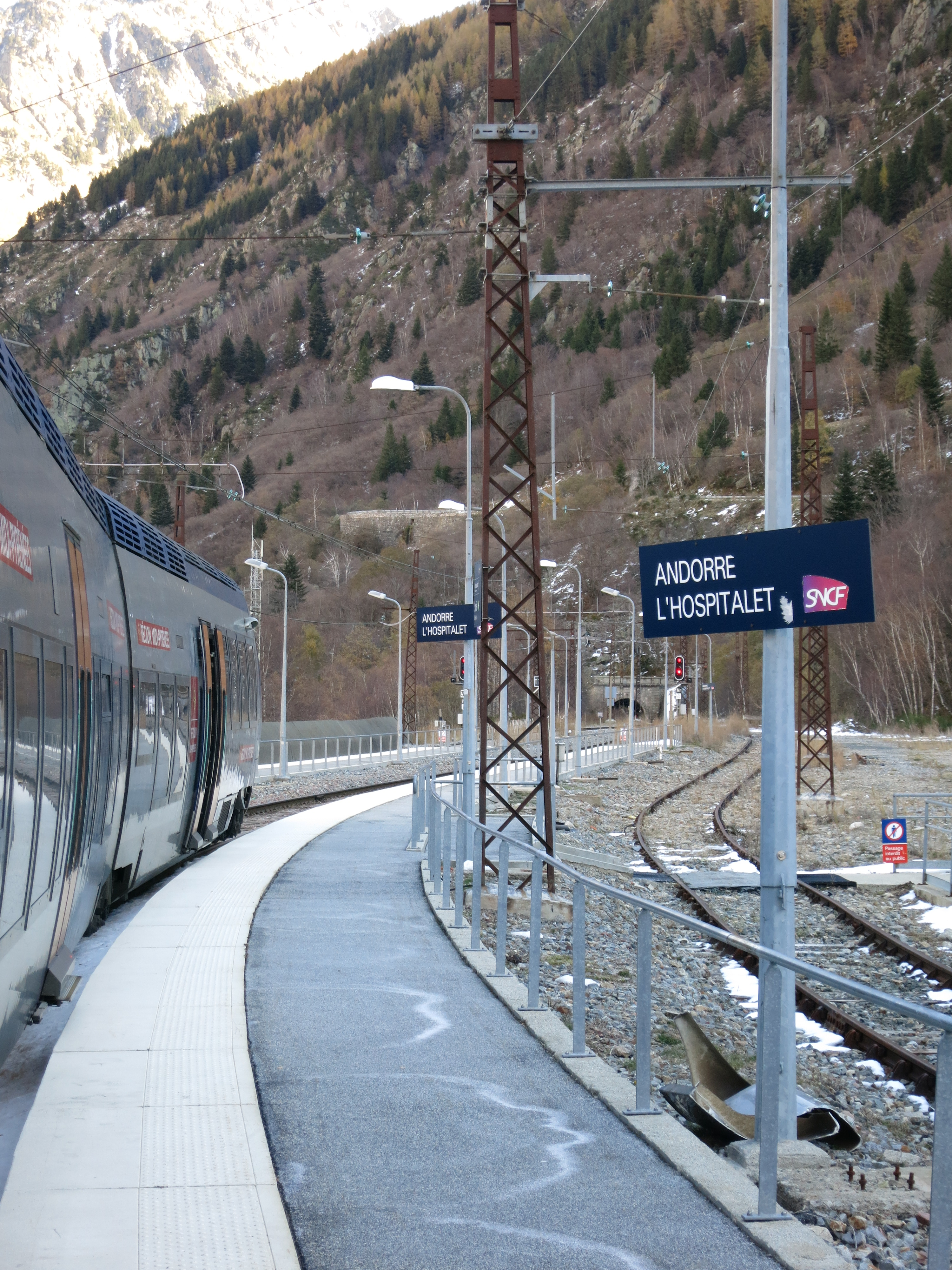 Bahnhof Andorre-L'Hospitalet